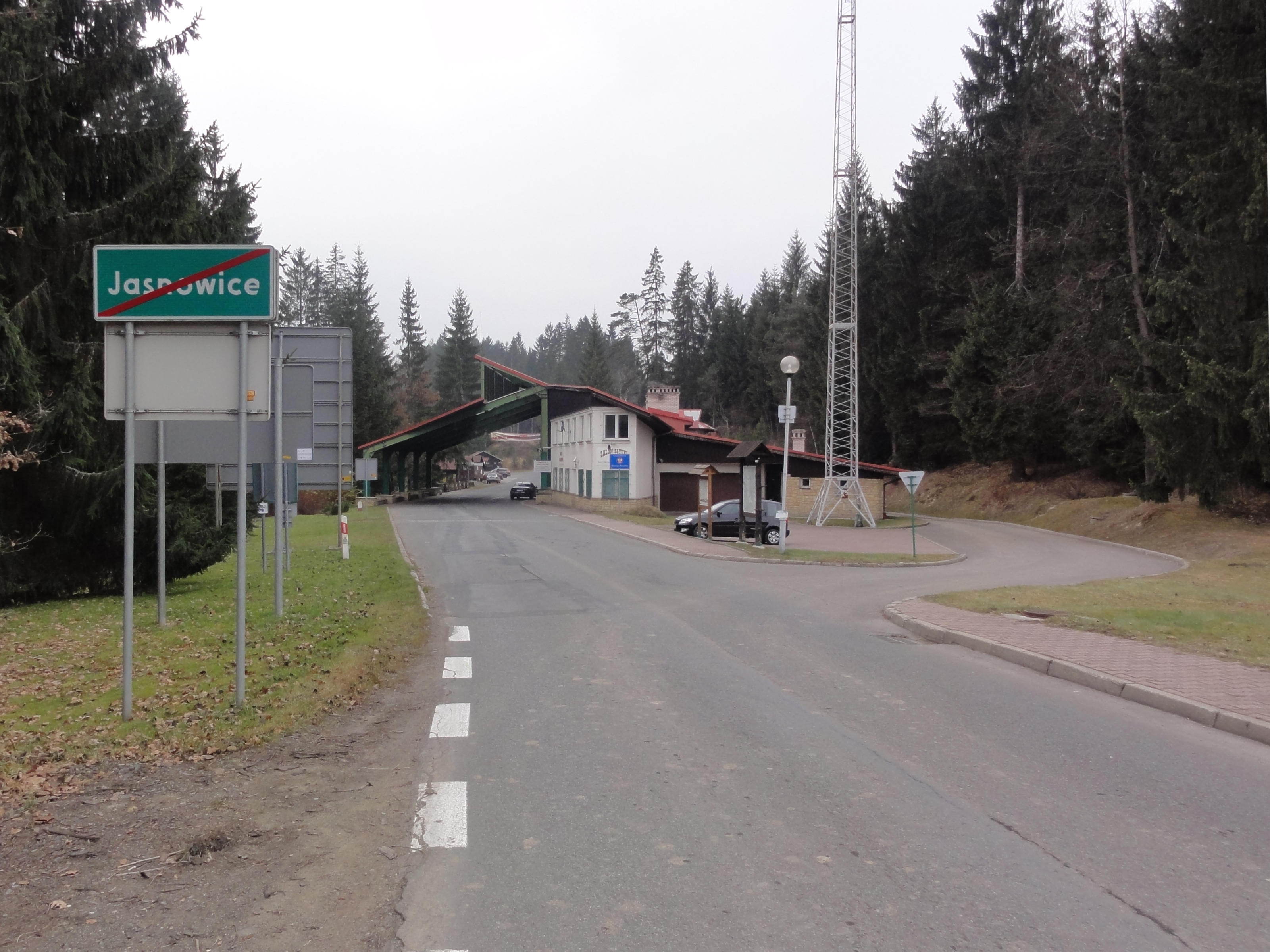 Byłe przejście graniczne Bukowiec (Republika Czeska) - Jasnowice/Istebna (Polska) od strony polskiej